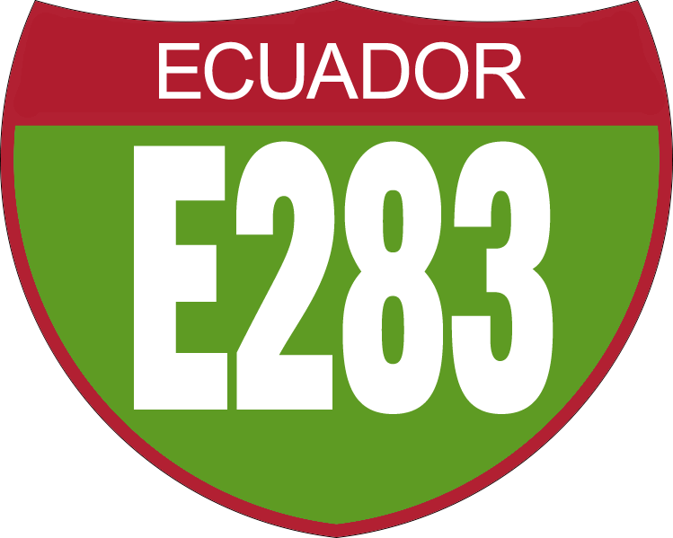 Disco de Identificación Ruta E283